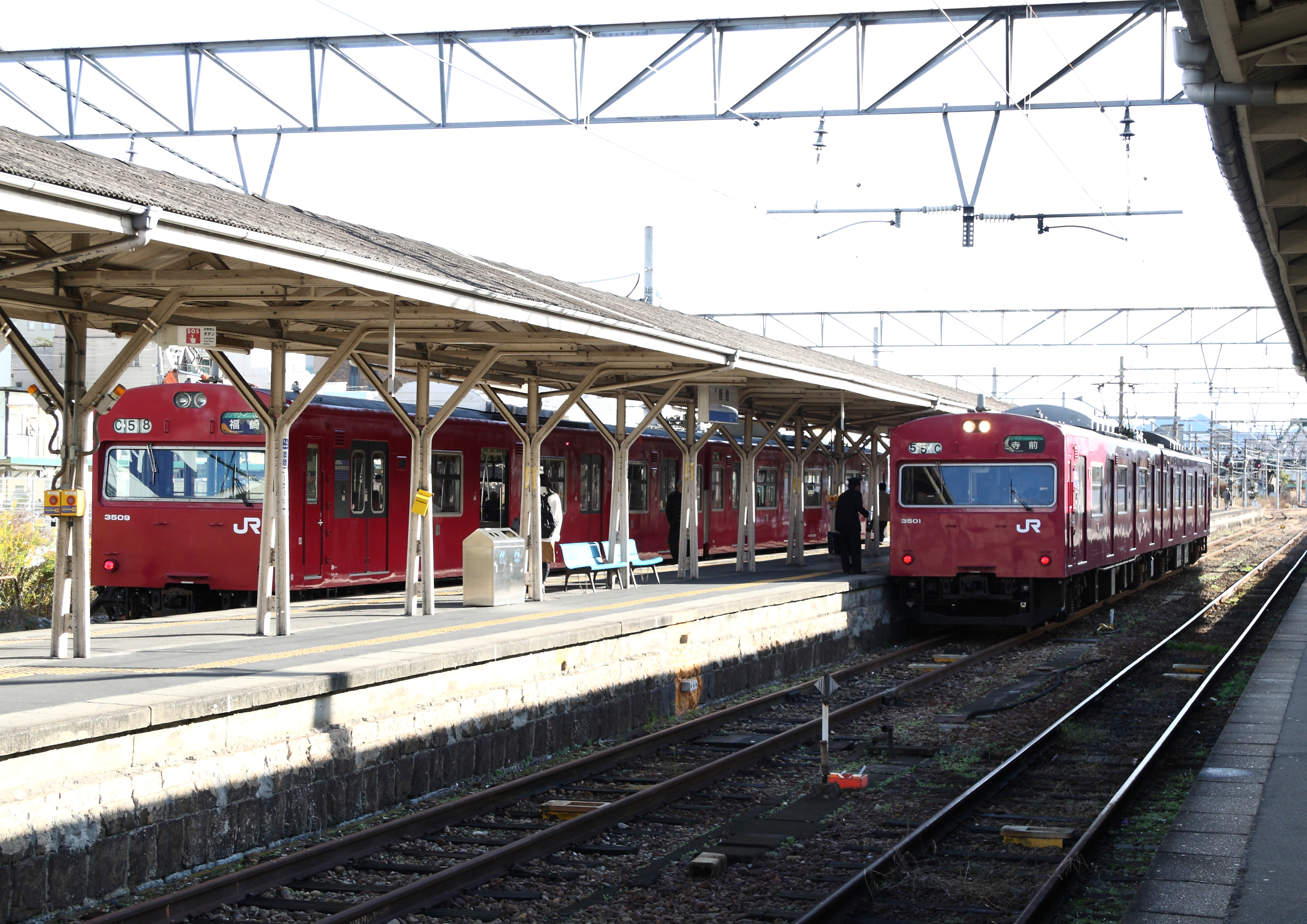 地上駅時代の姫路駅 播但線乗り場